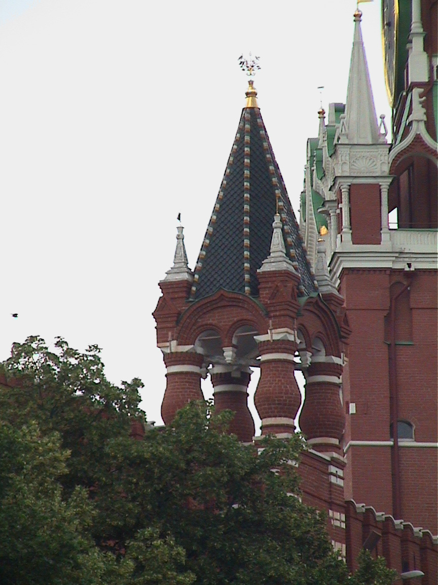 La tour du Tsar- le Kremlin à Moscou